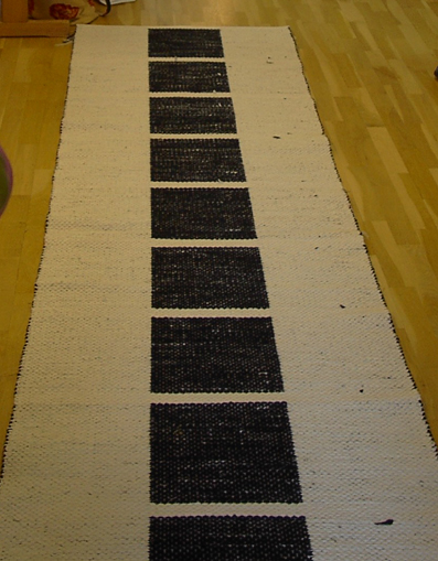 Dubbelvävd matta med trasor, rätan. Se även Avigan